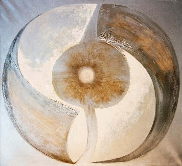 ÁLLANDÓSÁG (100x100 cm, olaj, vászon) Az élet középső szakasza, ami a fejlődéséhez képest zárt, egységes, viszonylag önálló teljességet adó fázis, ezért kapta a négyzet formátumot is. Azonban ez a viszonylagos zárt forma is elmozdul a harmadik képen.